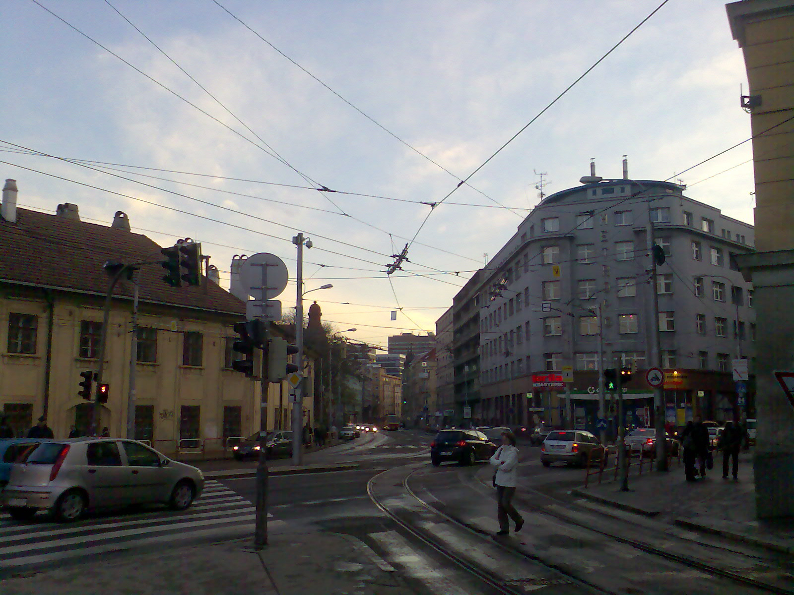 Americké námestie, Obytný dom a kino Metropol.